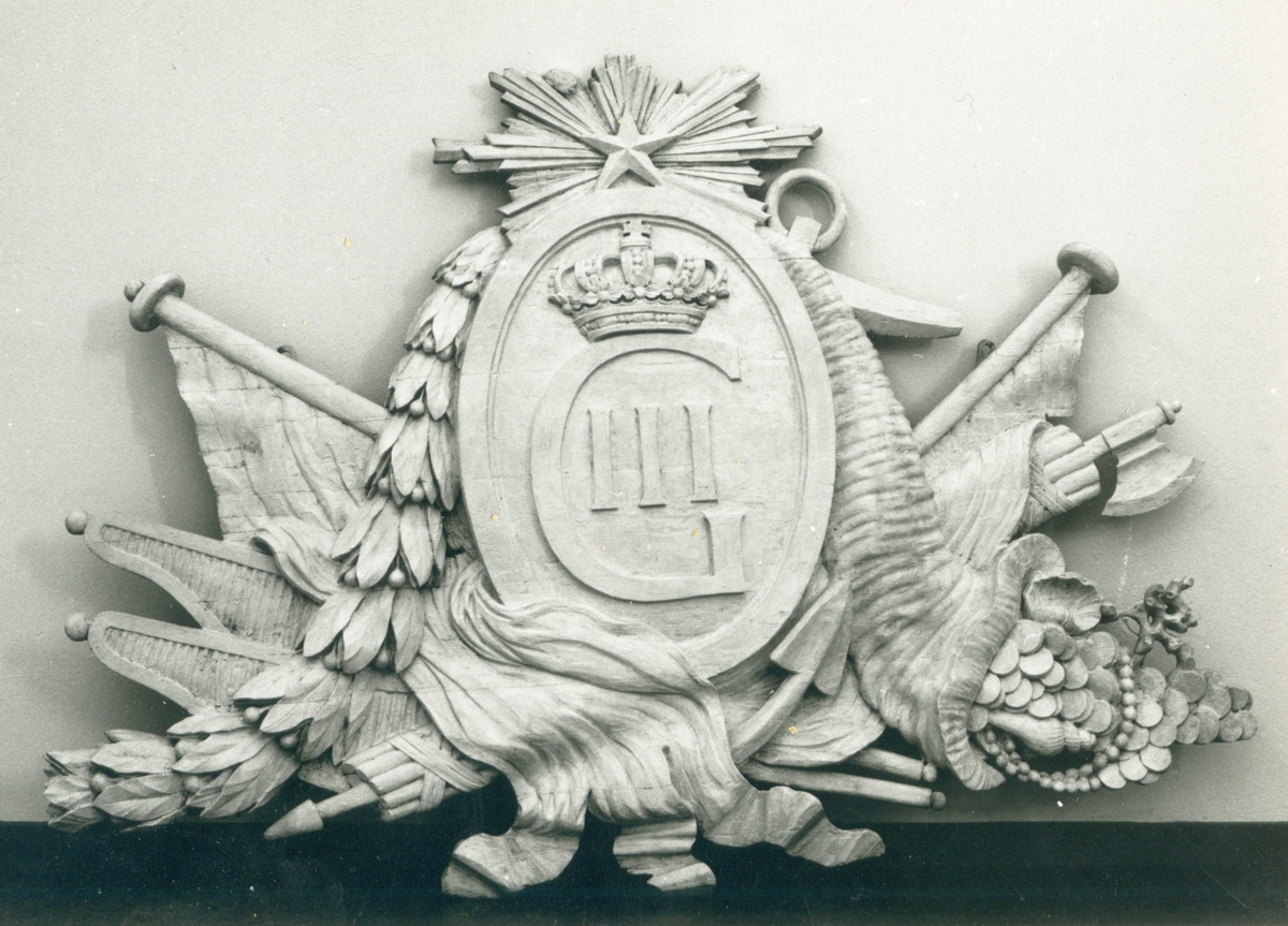 Akterspegelornamet till Linjeskeppet Konung Gustaf III från 1777.